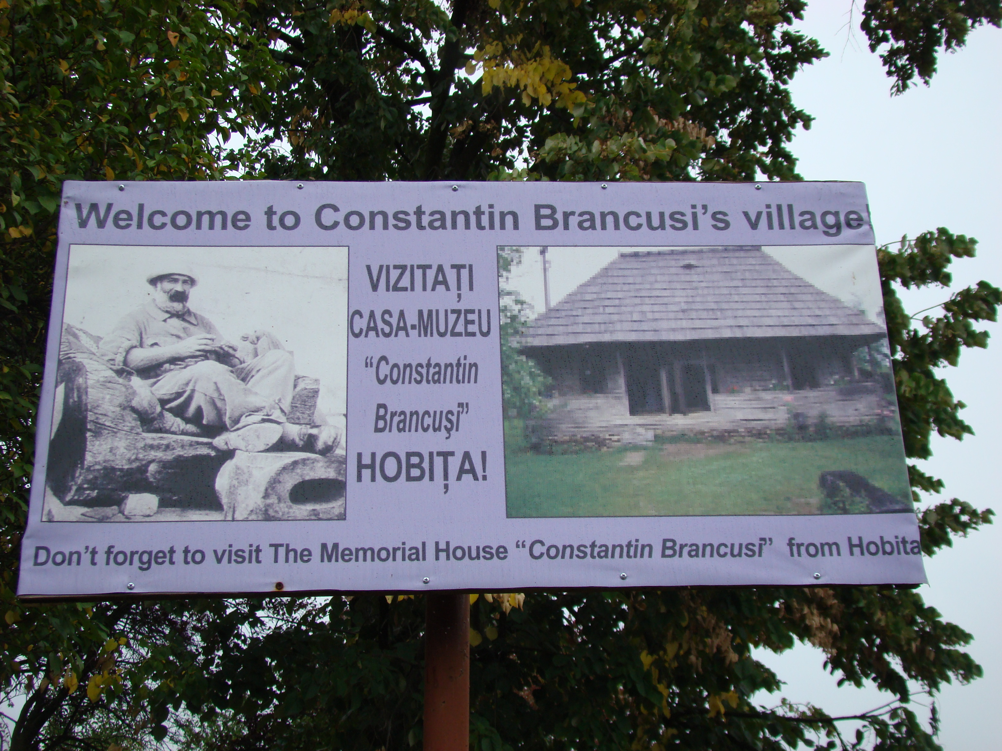 Casa memorială Constantin Brâncuși Hobița-Gorj